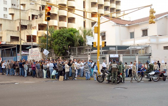 Movimentação nos postos de votação em Caracas, no referendo sobre a reforma constitucional.